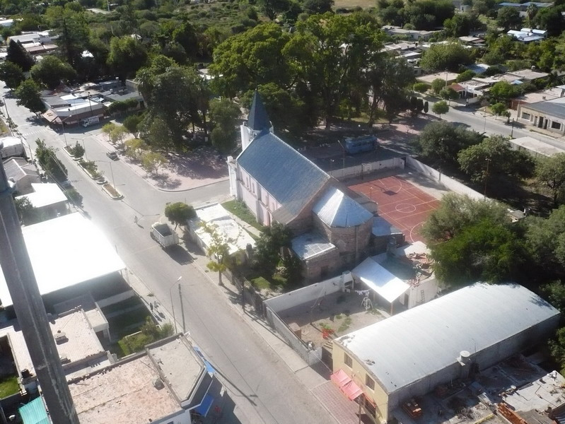 Saujil - Centro (vista aérea)